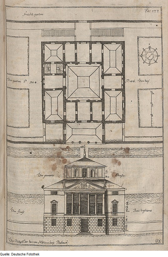 Original image description from the Deutsche Fotothek Architektur & Profanbau & Villa & Grundriss